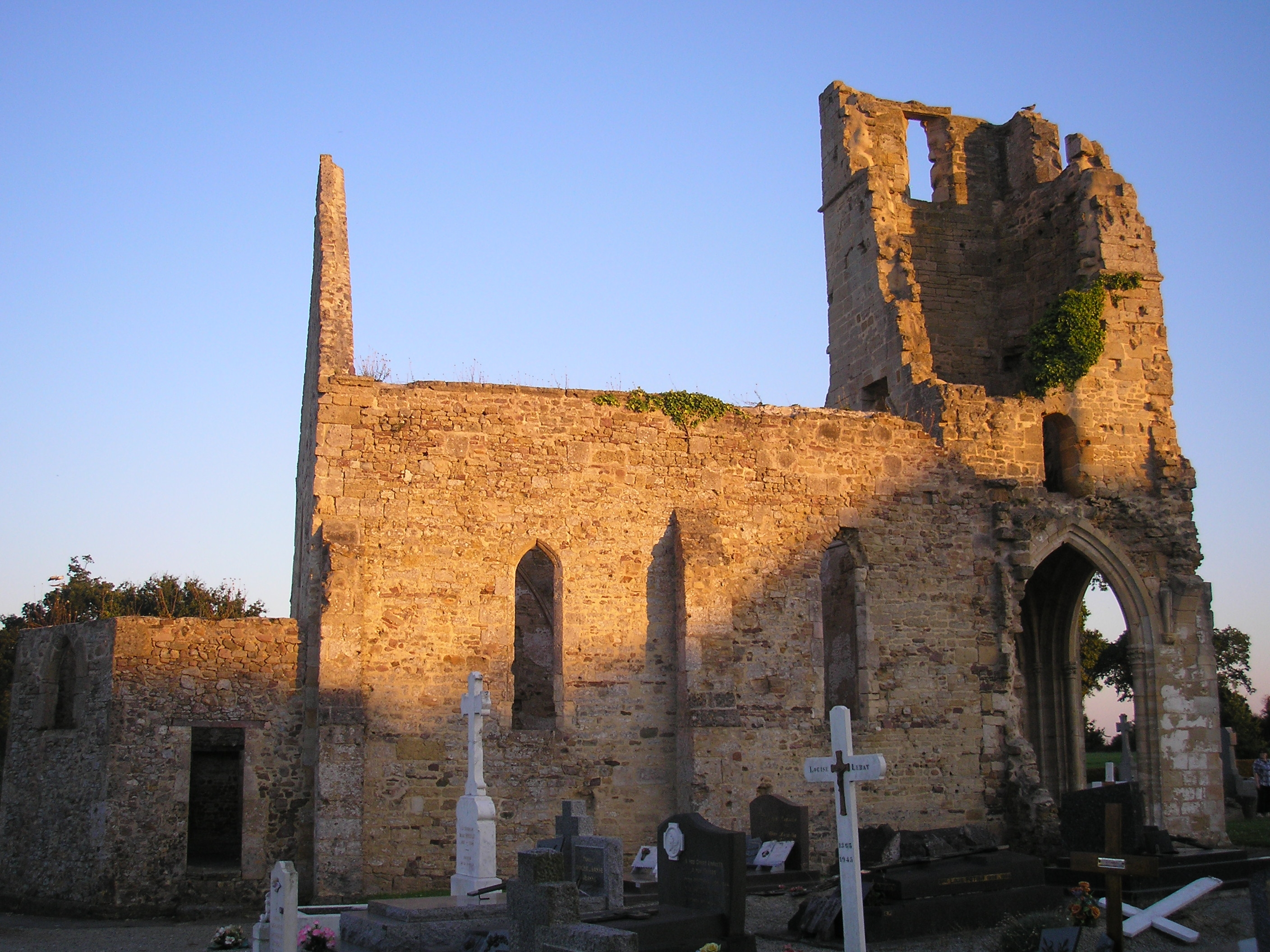 Auxais (Normandie, France). Ruine de l'église Saint-Martin.